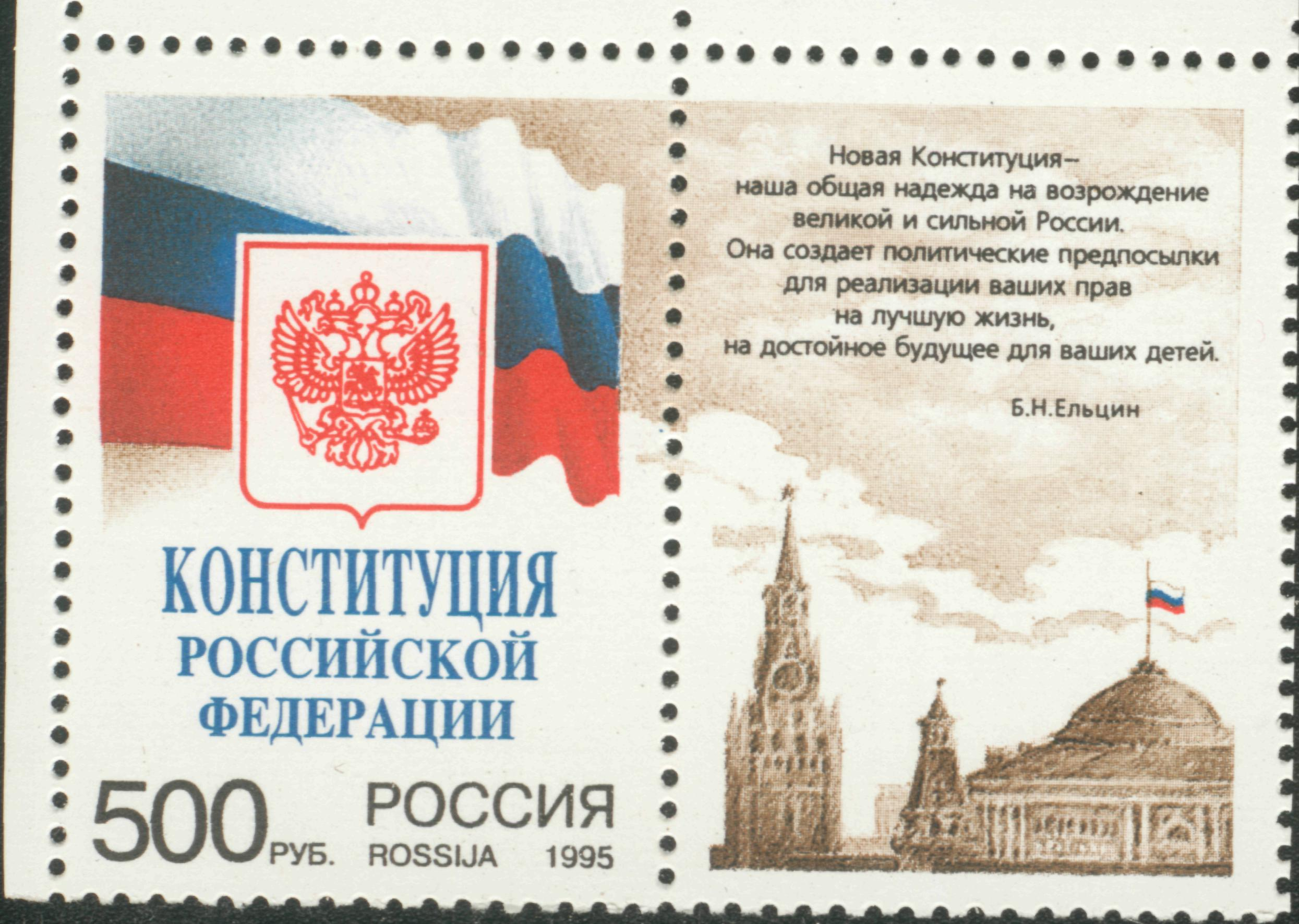 Почтовая марка России Конституция с правым купоном с текстом Ельцина/ Номинал 500 рублей, 1995. Чистая, ЦФА